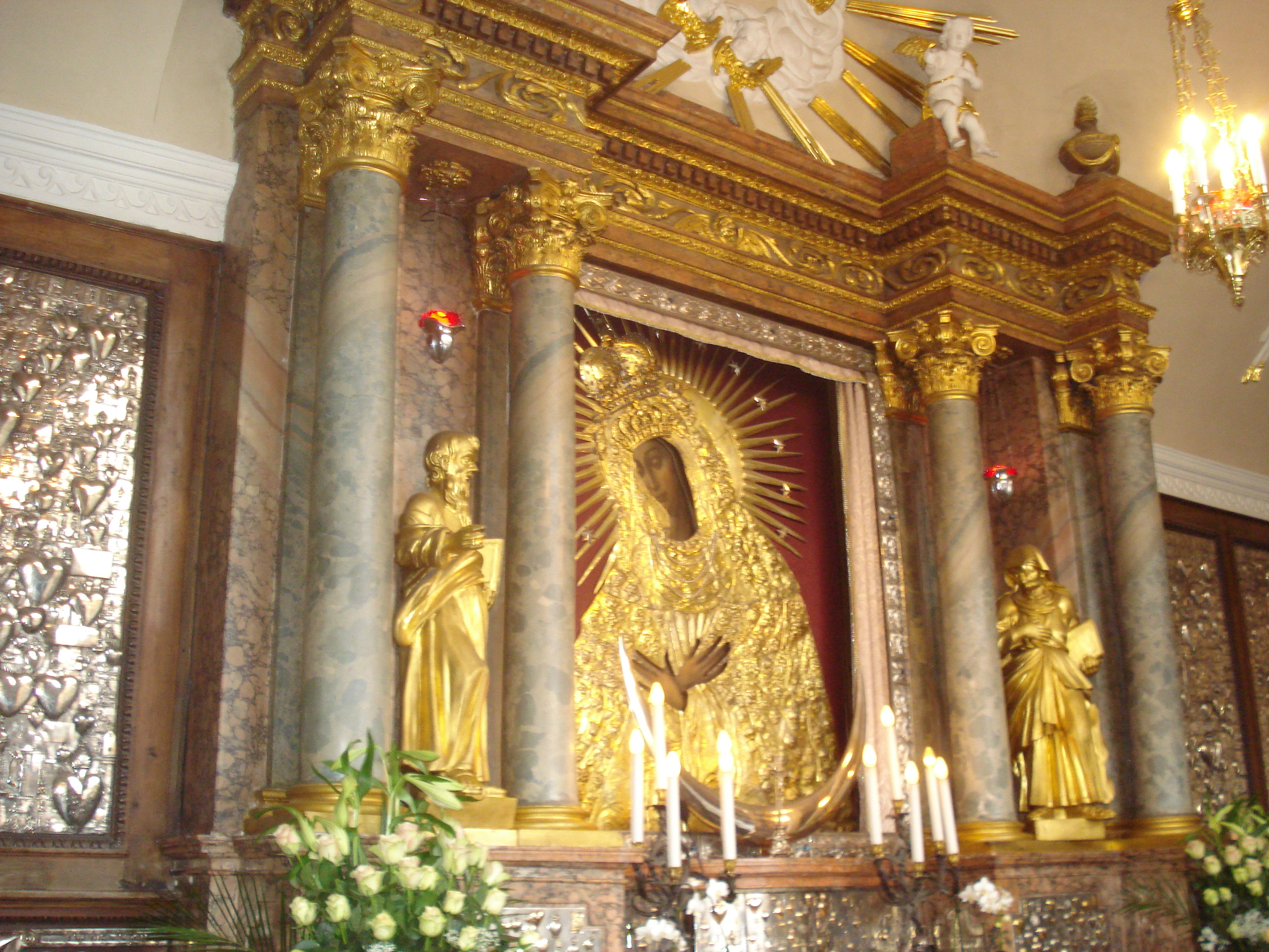 Мать Божия Остробрамская Matka Boska Ostrobramska Our Lady of the Gate of Dawn